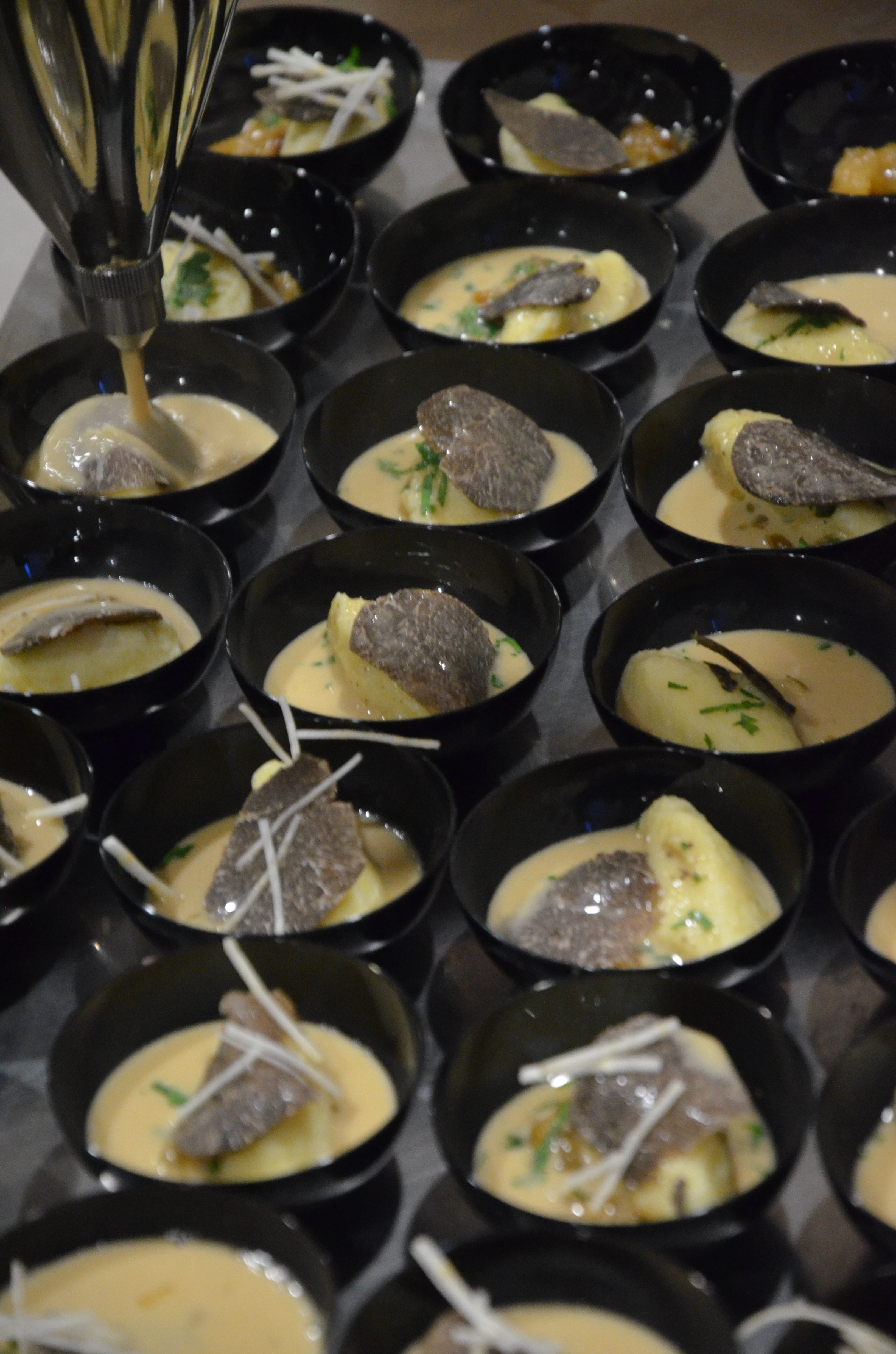 Gnocchis de céleri et bouillon de poule à la truffe noire à la fête de la truffe de Forcalquier